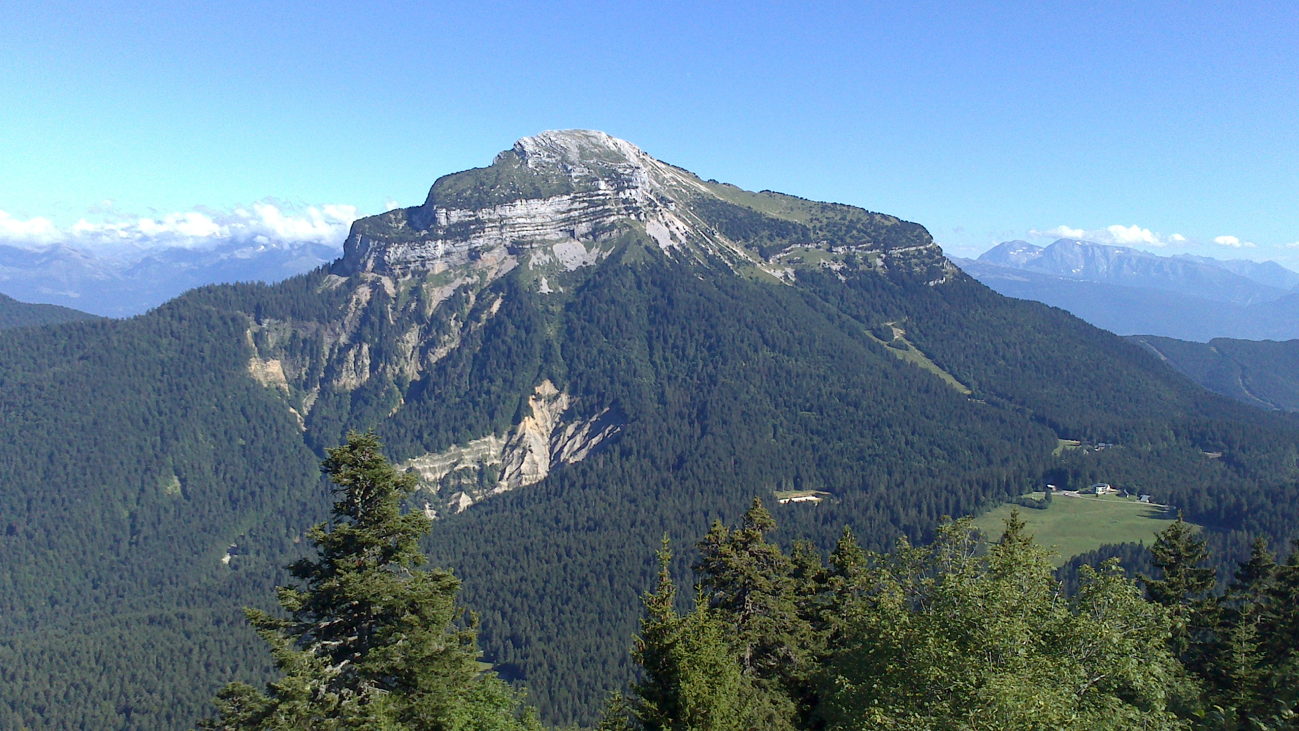 Chamechaude depuis l'oratoire d'Orgeval sur le Charmant Som